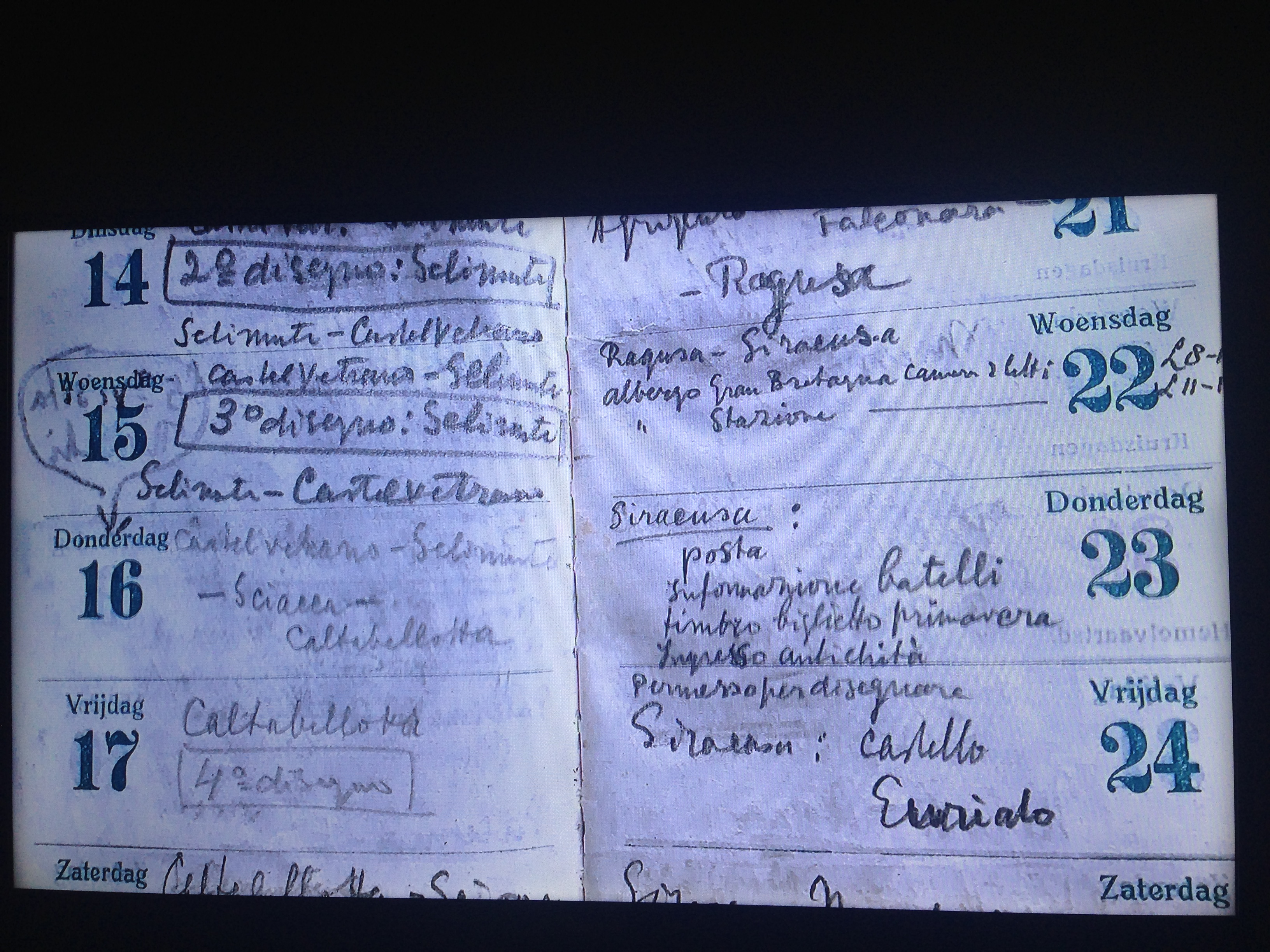 From Hescher exposition in Catania 2017